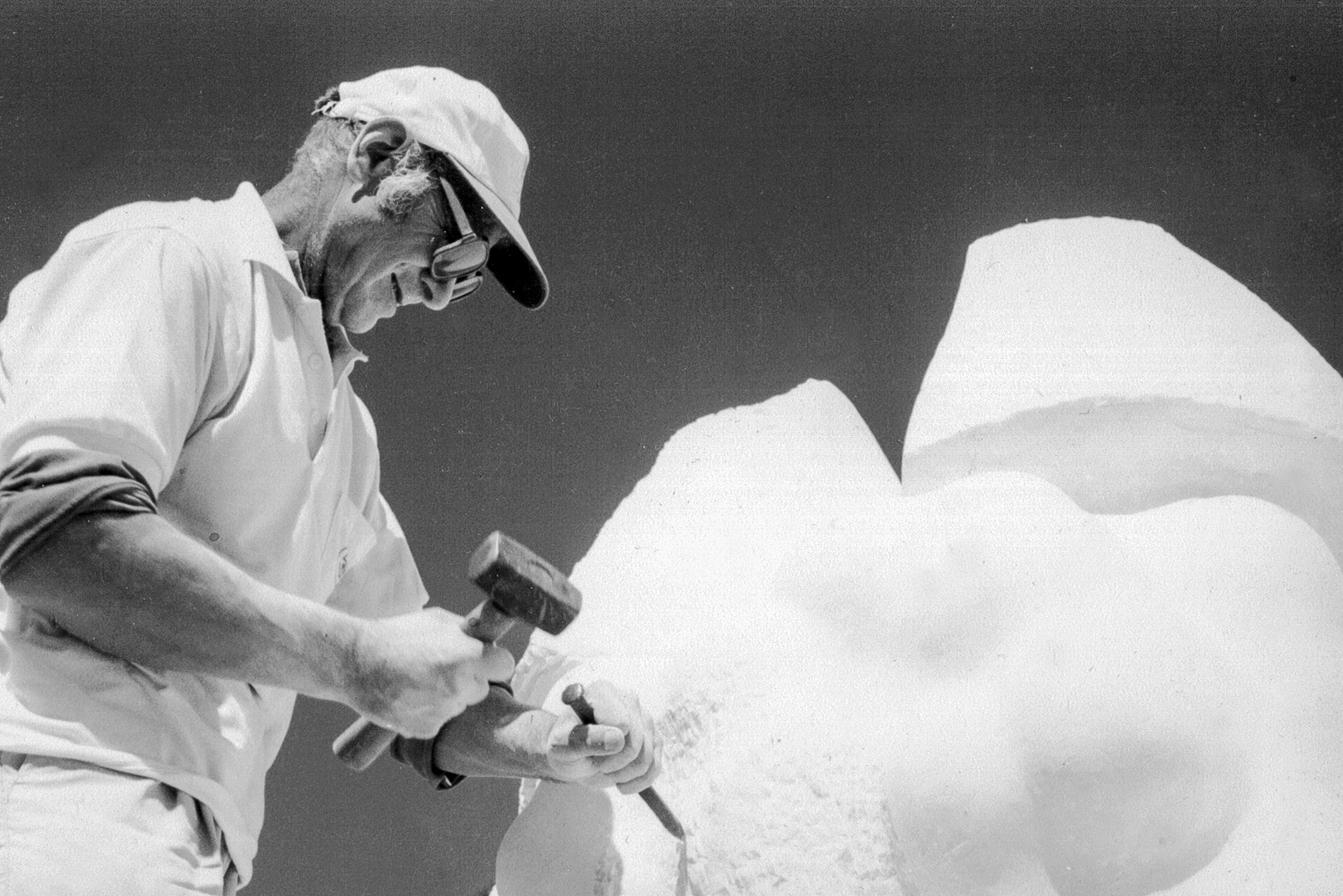 Ljubomir Denkovic - Rad na skulpturi u prostoru